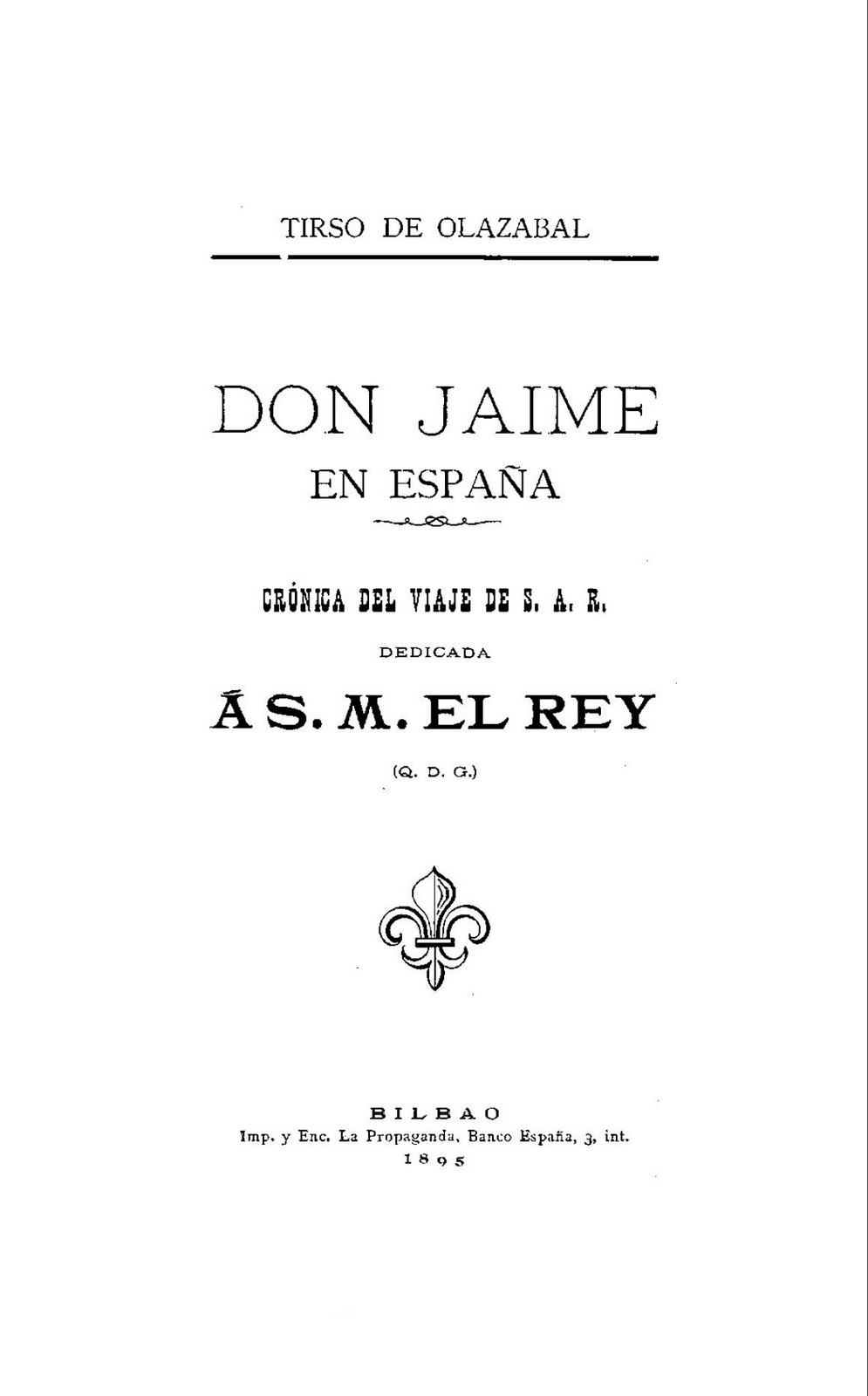 Portada del libro de Tirso de Olazábal «Don Jaime en España»